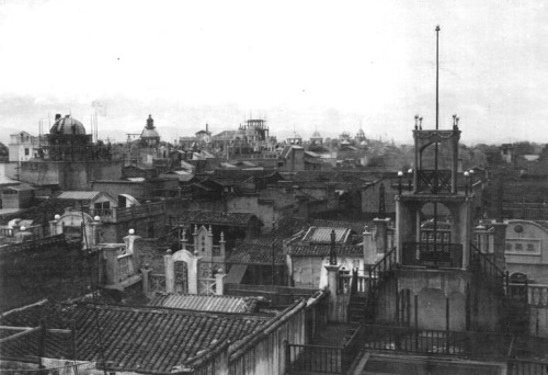 贛語: 南昌老城一隅